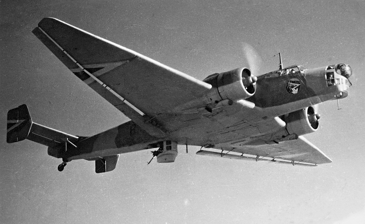 Junkers Ju-86 K-2 típusú repülőgép. Tags: transport, vehicle, Royal Hungarian Air Force, airplane, Junkers-brand, military, Hungarian air force, Gerrman brand Title: Junkers Ju-86 K-2 típusú repülőgép.